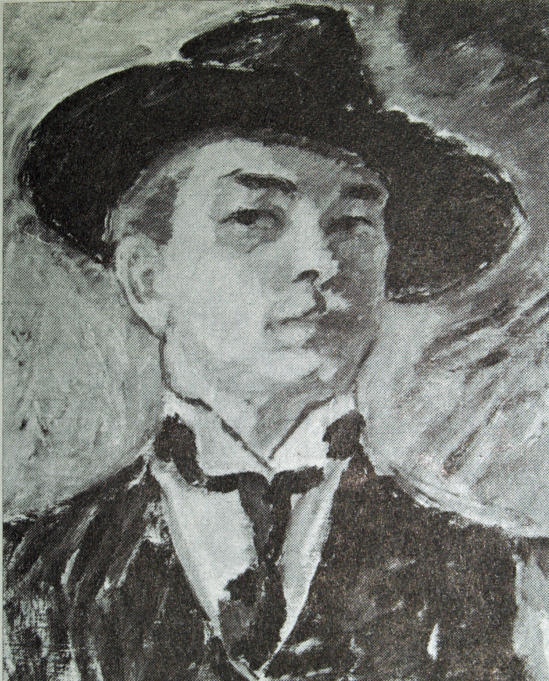 Kosti Meriläisen (1886–1938) omakuva vuodelta 1915